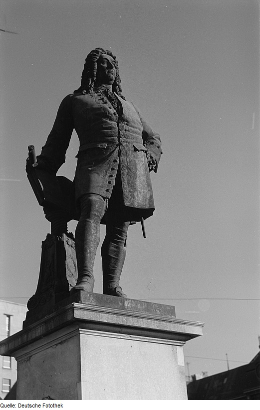 Original image description from the Deutsche Fotothek Händeldenkmal auf dem Marktplatz